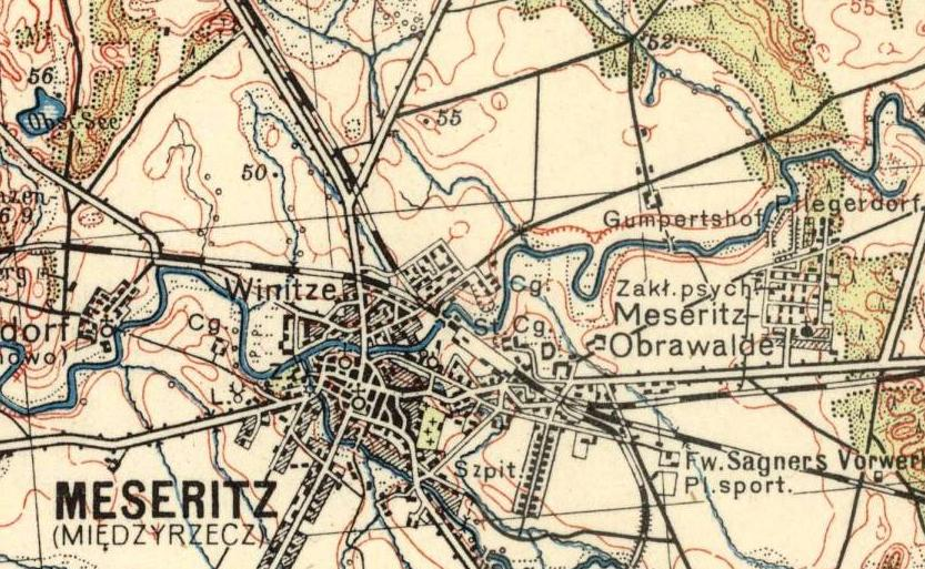 Plan Międzyrzecza z 1936